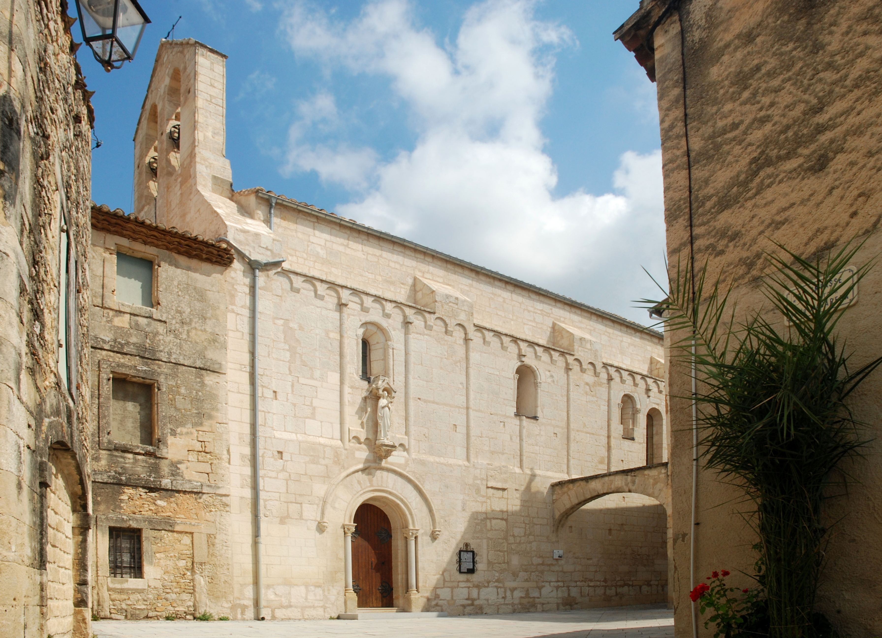 France - Languedoc - Hérault - Église Sainte-Agathe de Valergues